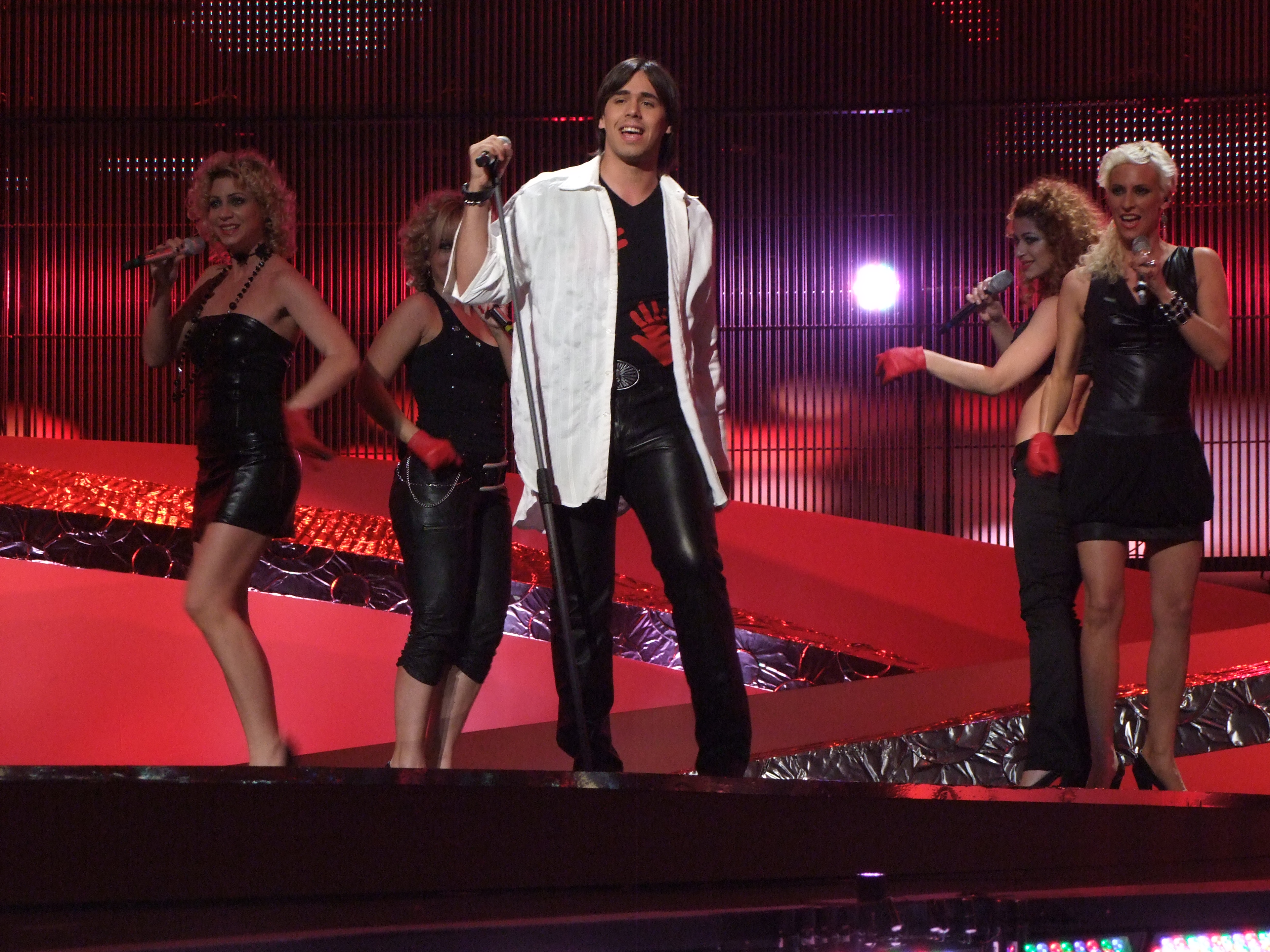 Eurovision Song Contest 2008, 1st semifinalMontenegro: Stefan Filipović - Zauvijek volim te